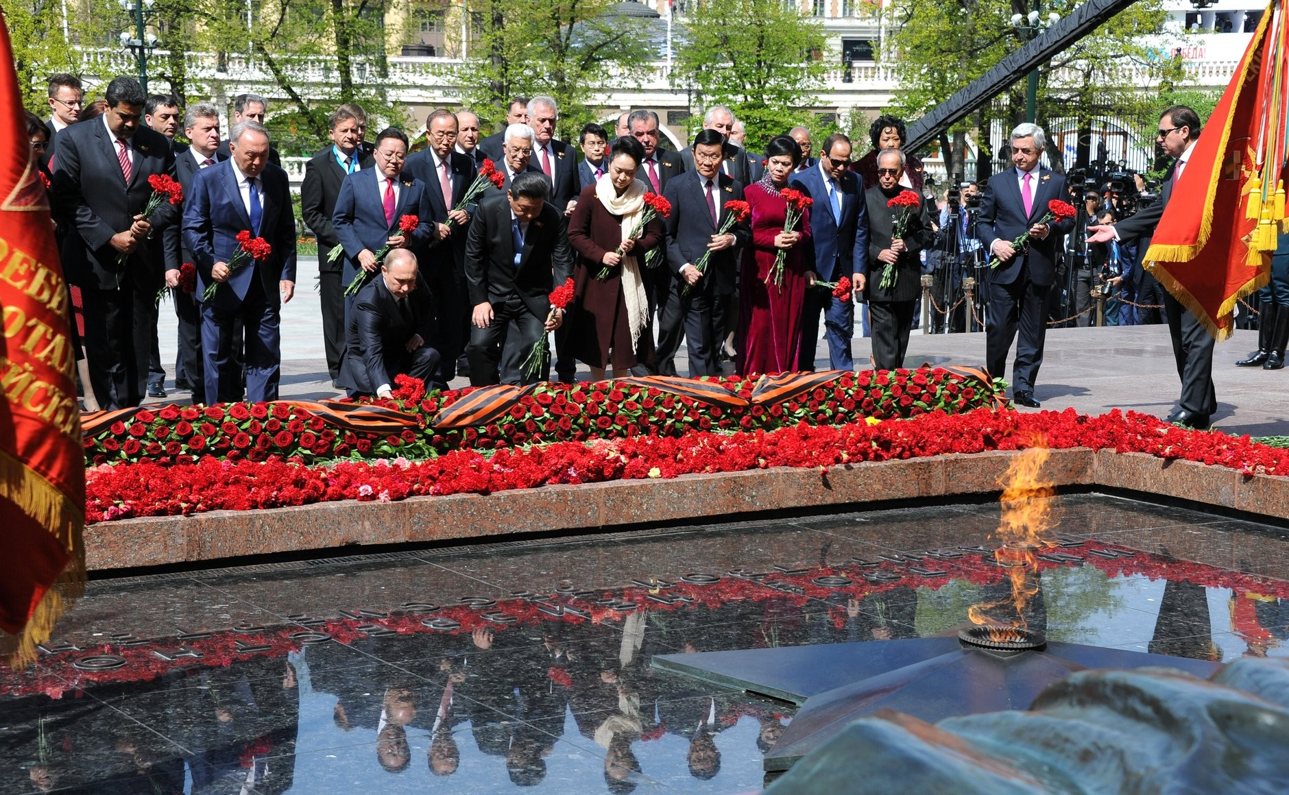 Вместе с главами иностранных государств и правительств Владимир Путин почтил память погибших в Великой Отечественной войне, возложив цветы к Могиле Неизвестного Солдата в Александровском саду.